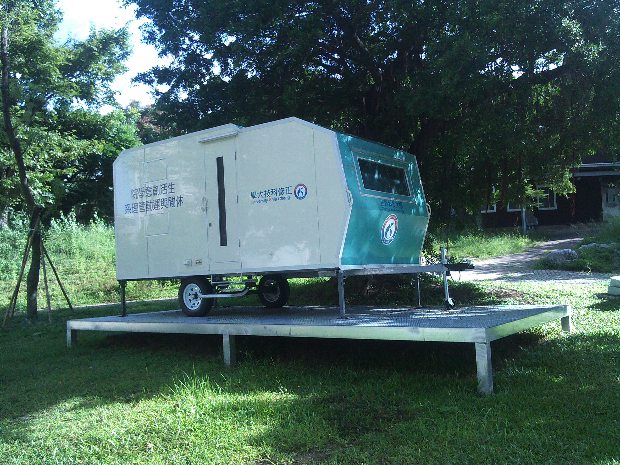 位於校區西南隅 生創大樓旁